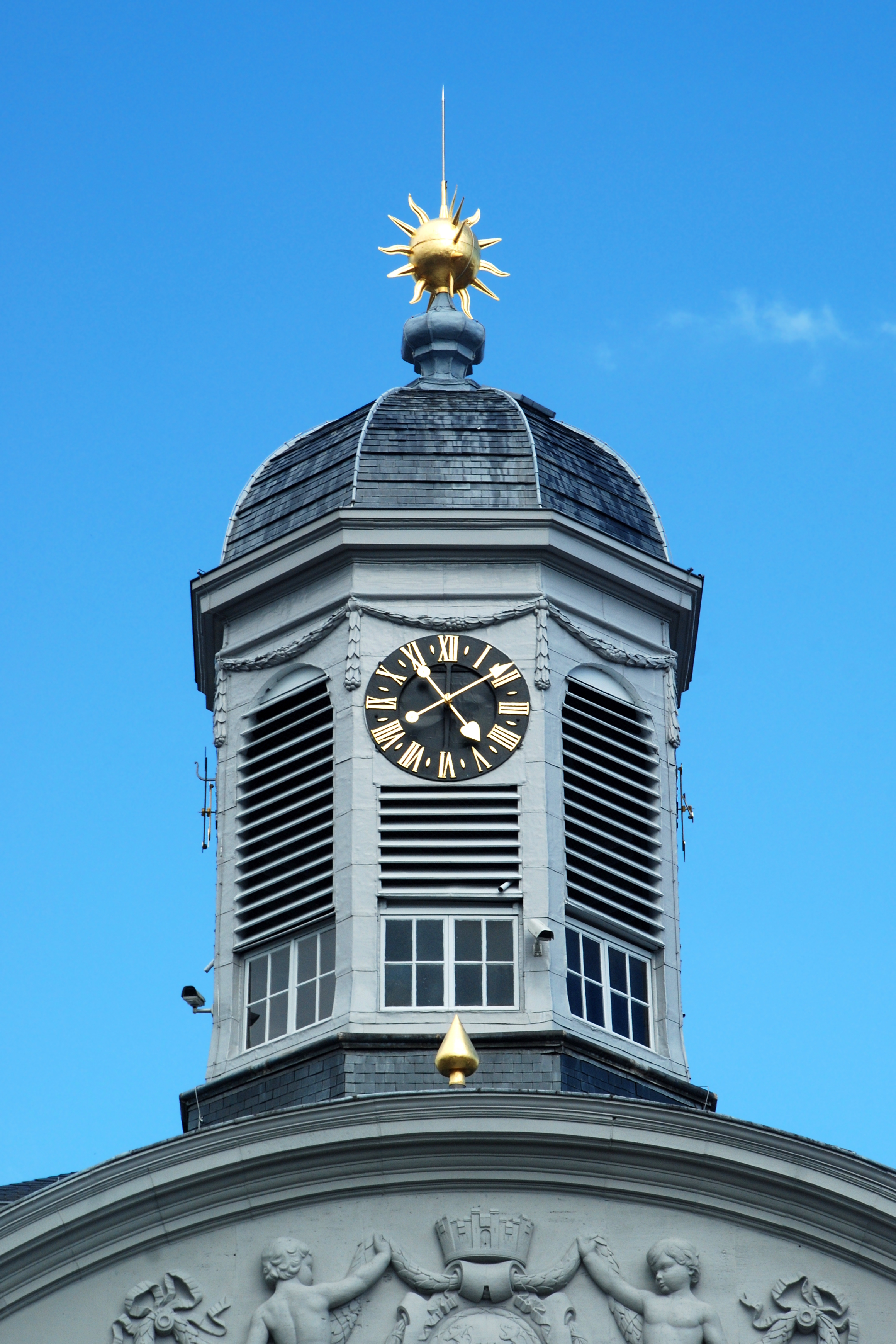 Belgique - Province de Liège - Hôtel de ville de Verviers